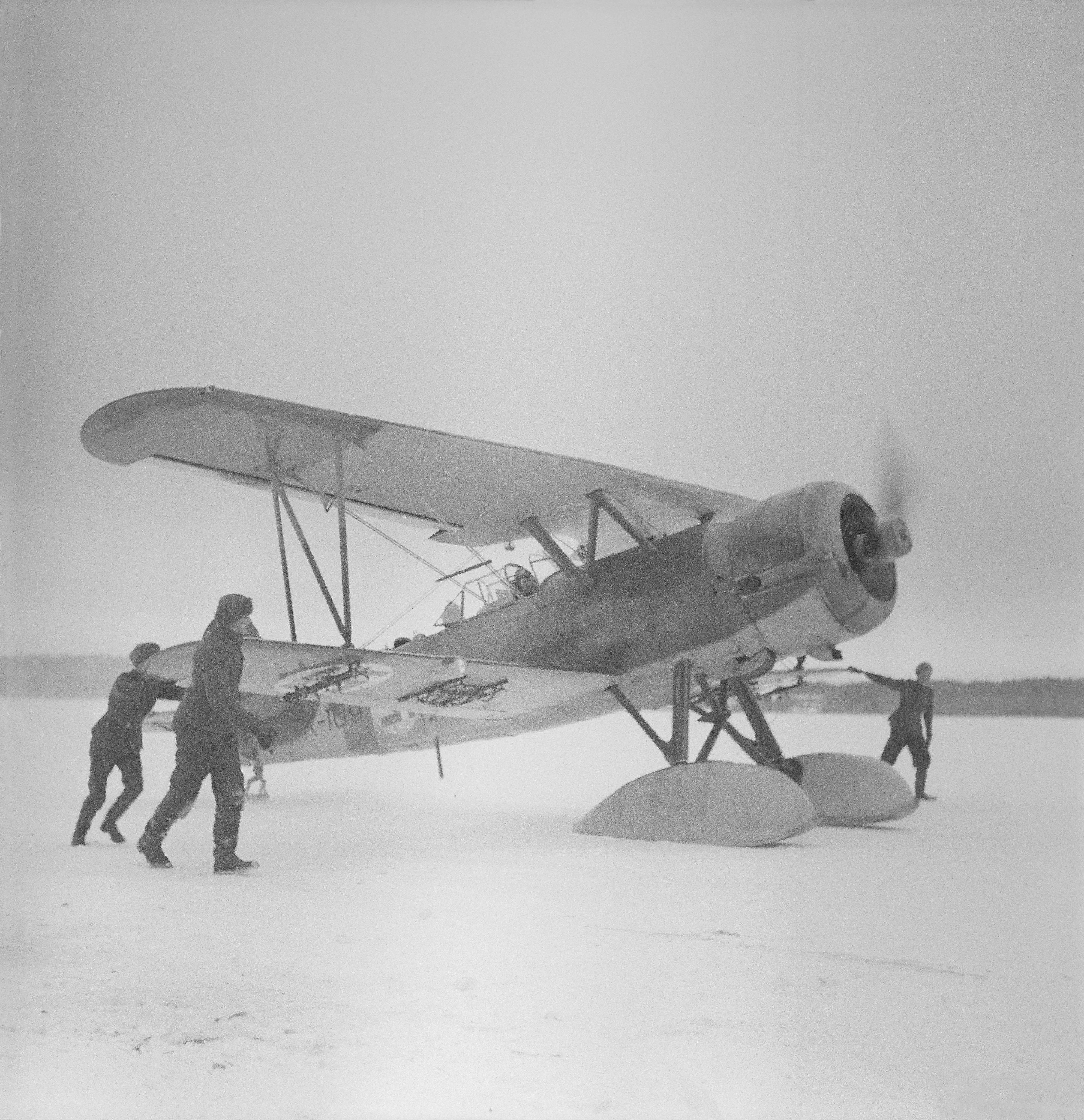 Lento on tehty ja mekanikot ohjaavat koneen paikoilleen. (Kuvassa on Fokker C.X tiedustelukone). Kuvauspaikka: Viiksjärvi